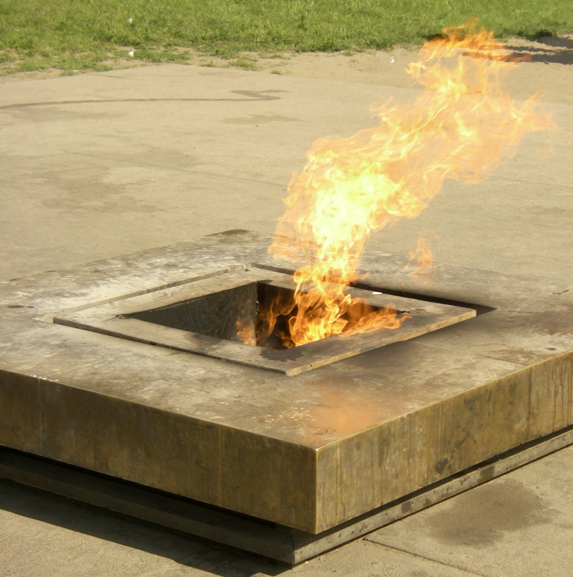 Вечный огонь на Марсовом поле в Санкт-Петербурге (Россия).